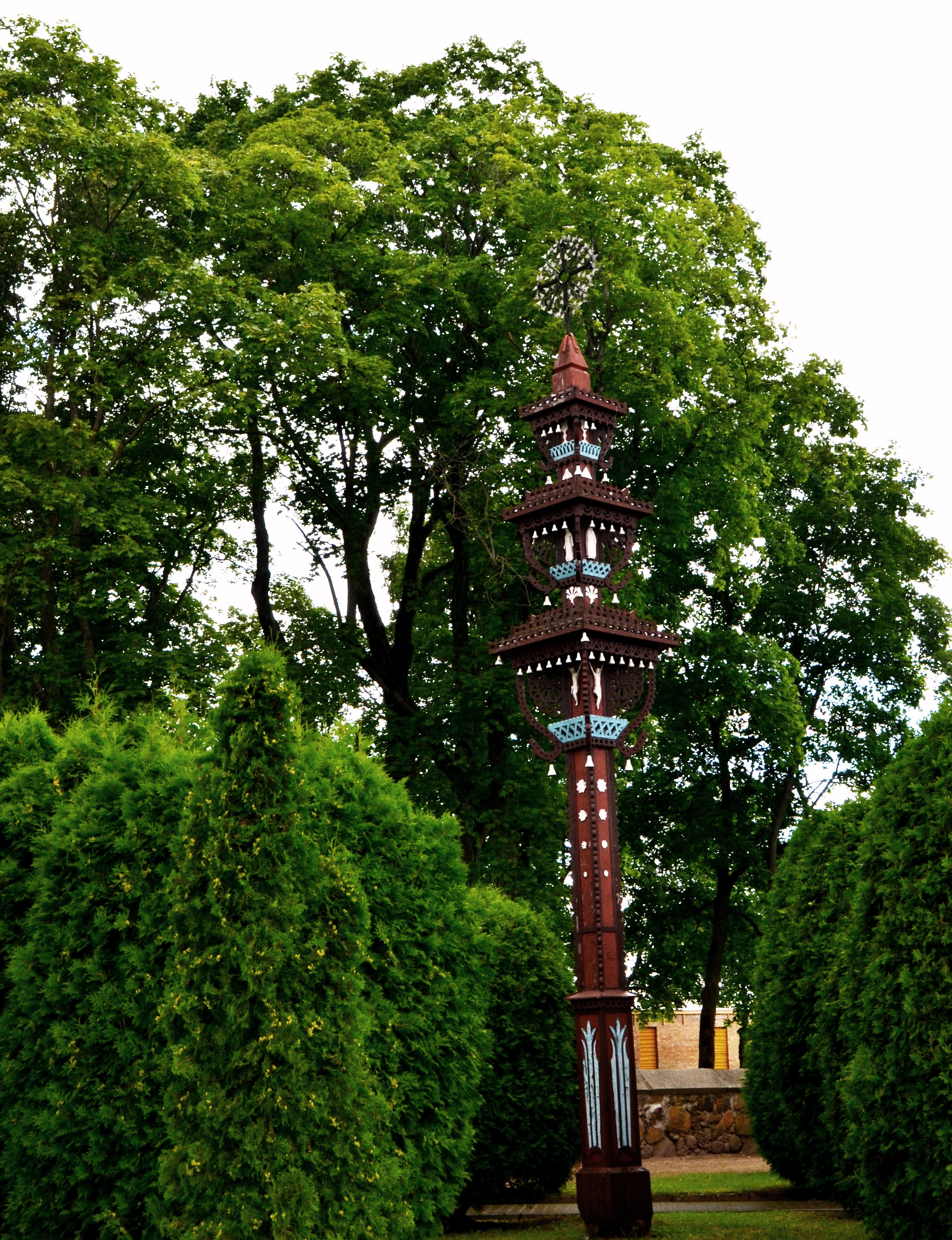 Stogastulpis šventoriuje, Krekenava, Panevėžio raj.